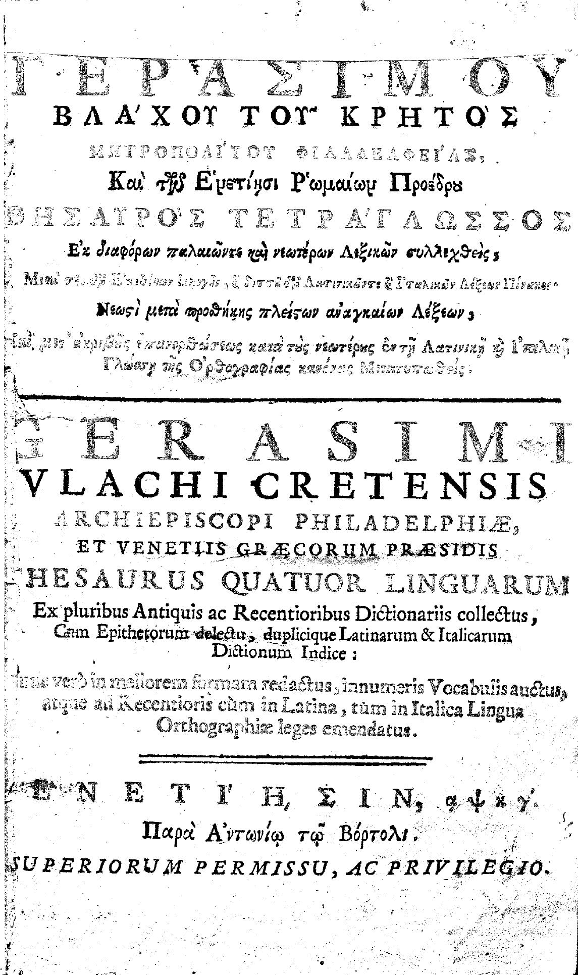 Εξώφυλλο βιβλίου Θησαυρός τετράγλωσσος